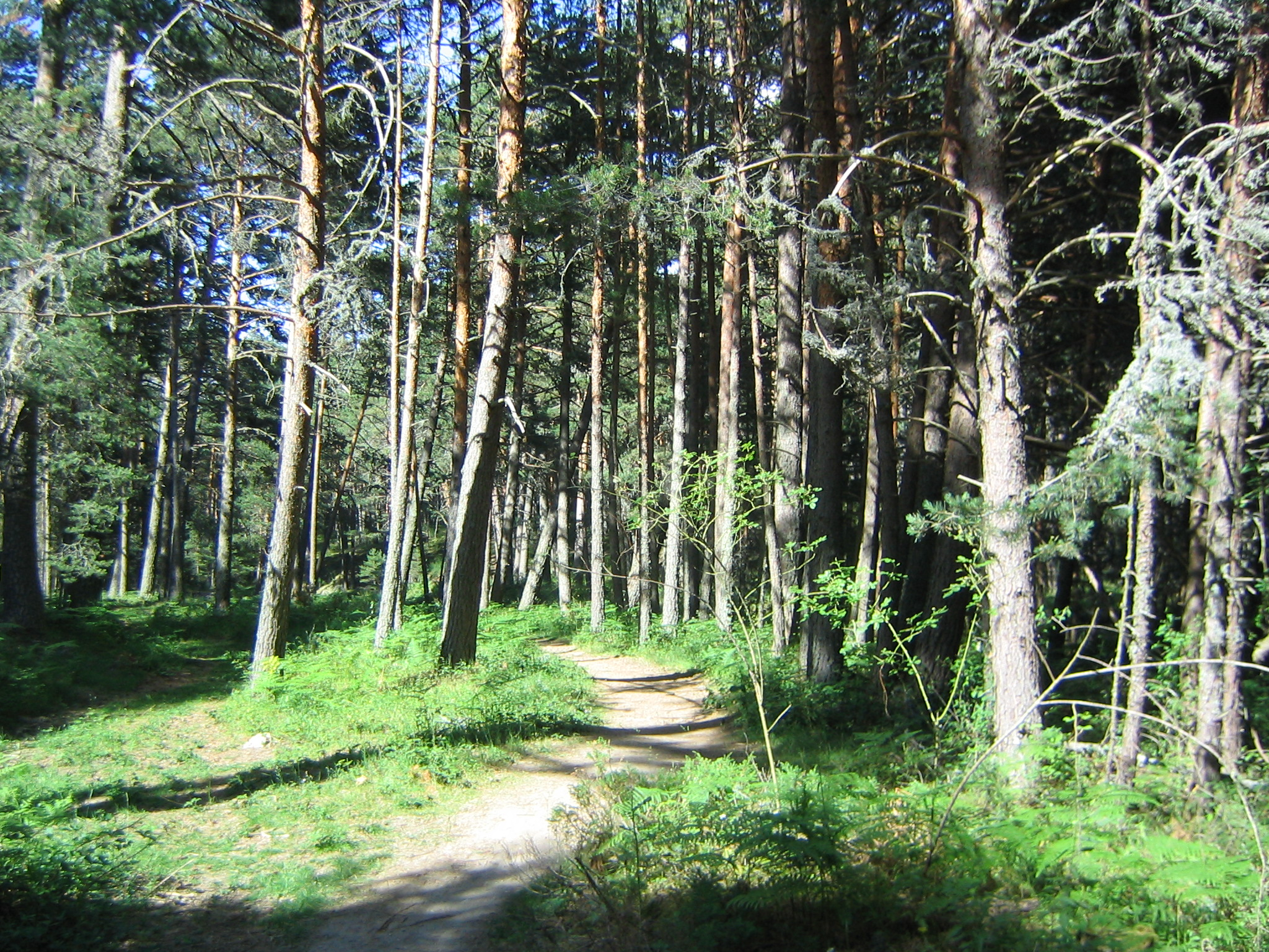 Pinar en el valle de Valsaín, Segovia España